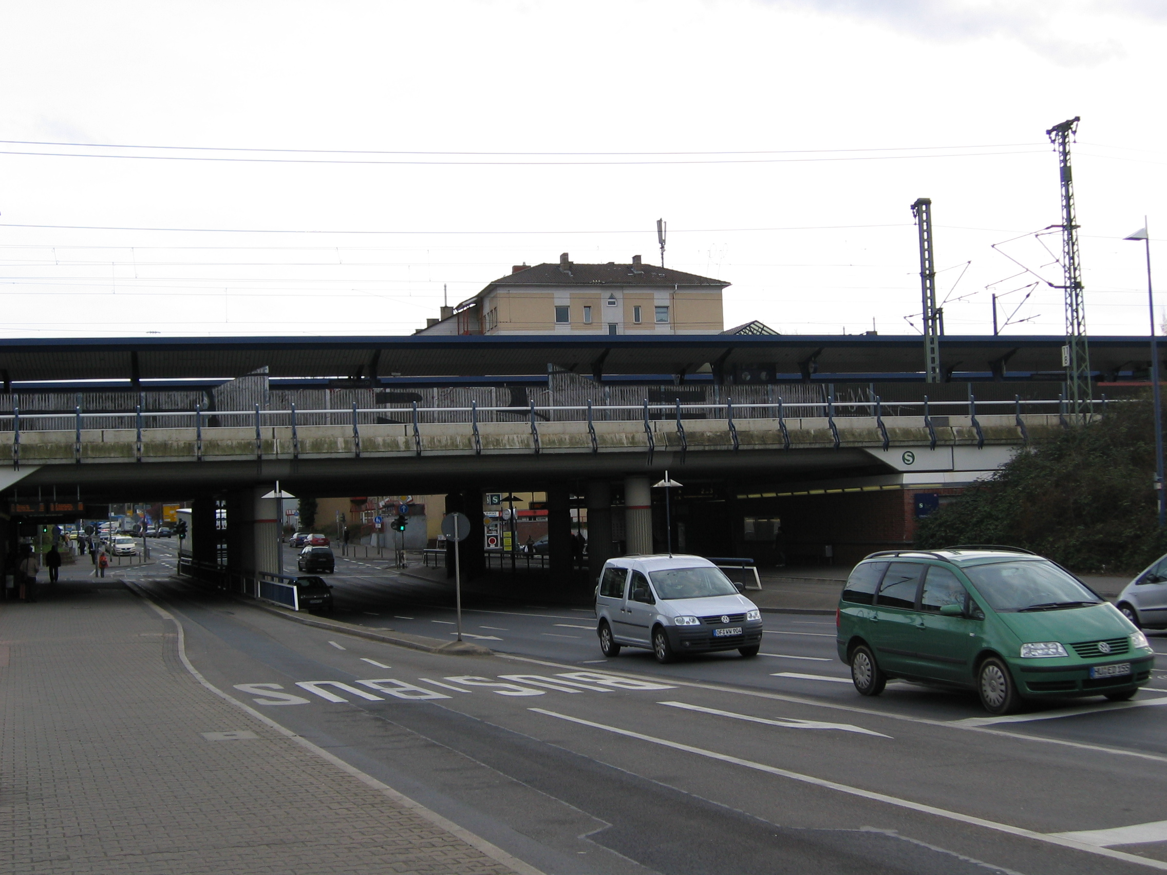 Station Offenbach am Main-Ost and the Federal Road B43, view in southly direction / Bahnhof Offenbach am Main-Ost und die Bundesstraße B43, Blick in südliche Richtung